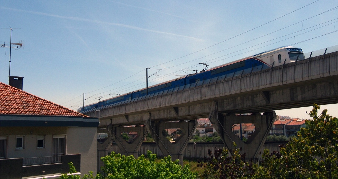 UQE a caminho de Corroios